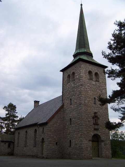 Kolbotn kirke i Oppegård kommune, Akershus, Norway